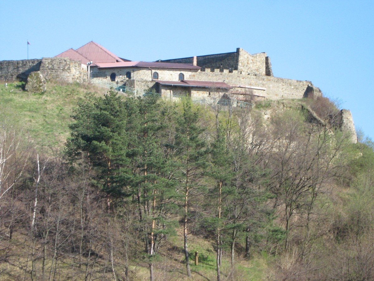 Zamek dobczycki